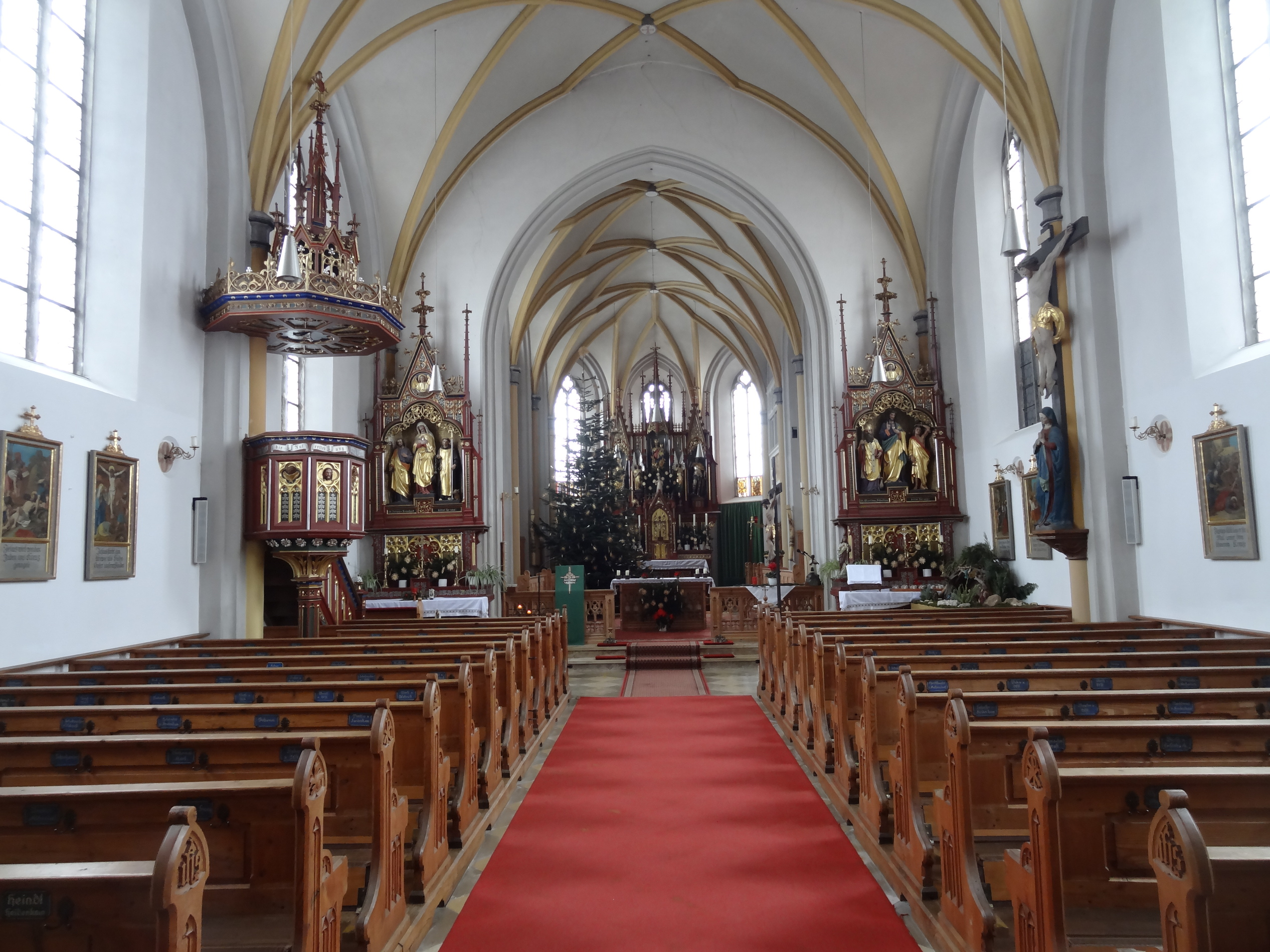 Innenraum der Pfarrkirche St. Georg in Ast (Gde. Tiefenbach, Lkr. Landshut, Bayern)